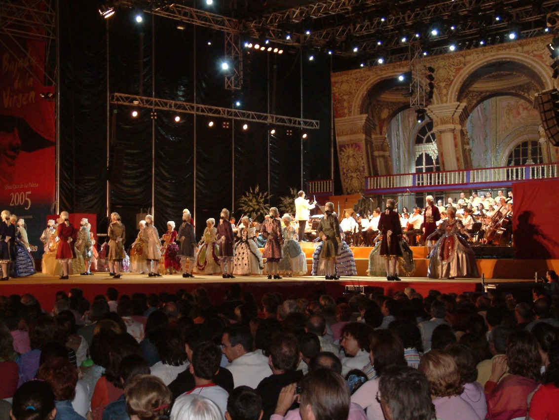 Festival del Siglo XVIII o Minué. (Obra: Minué de los Aires en Re de Luis Cobiella Cuevas). 13 de junio de 2005. Santa Cruz de la Palma. Bajada de la Virgen de las Nieves 2005.